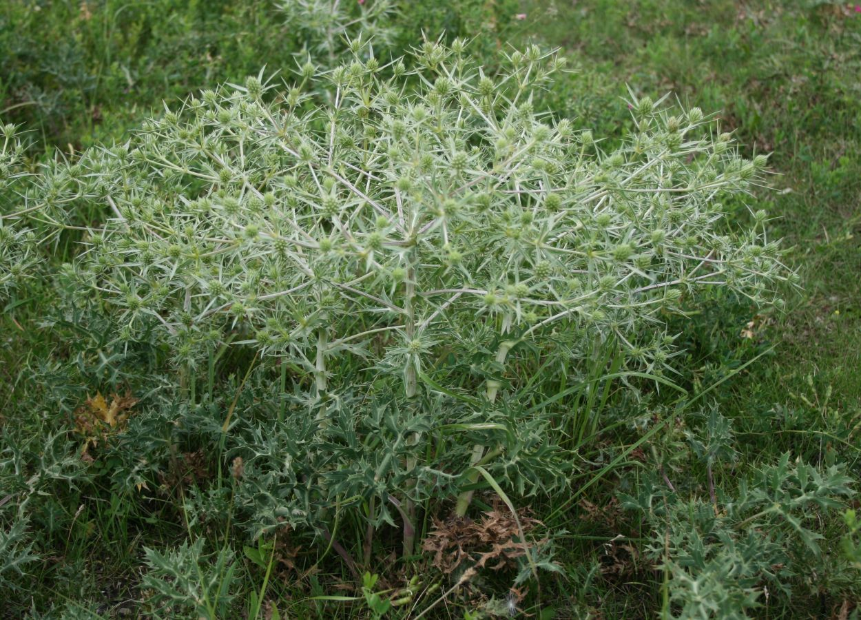 Feld-Mannstreu (Eryngium campestre), Doldenblütler (Apiaceae) - Österreich/Austria/Autriche: Niederösterreich, Wiener Becken, SE Leobersdorf